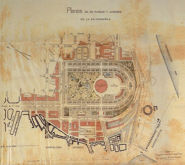 Proyecto del parque de la Ciudadela de Josep Fontserè (1872).